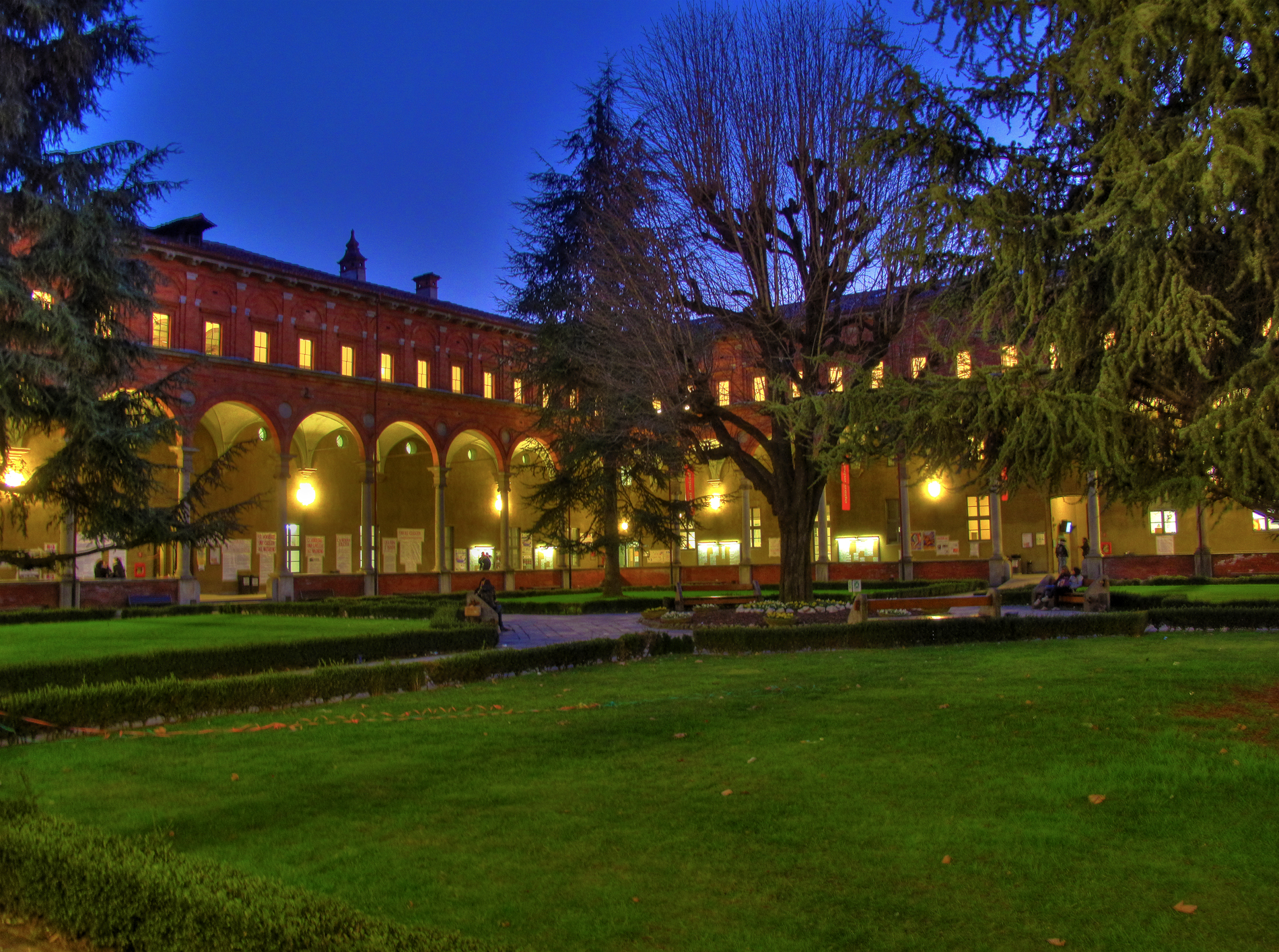 Secondo chiostro dell'università. Bracketing Exp (-2 , 0 2 )